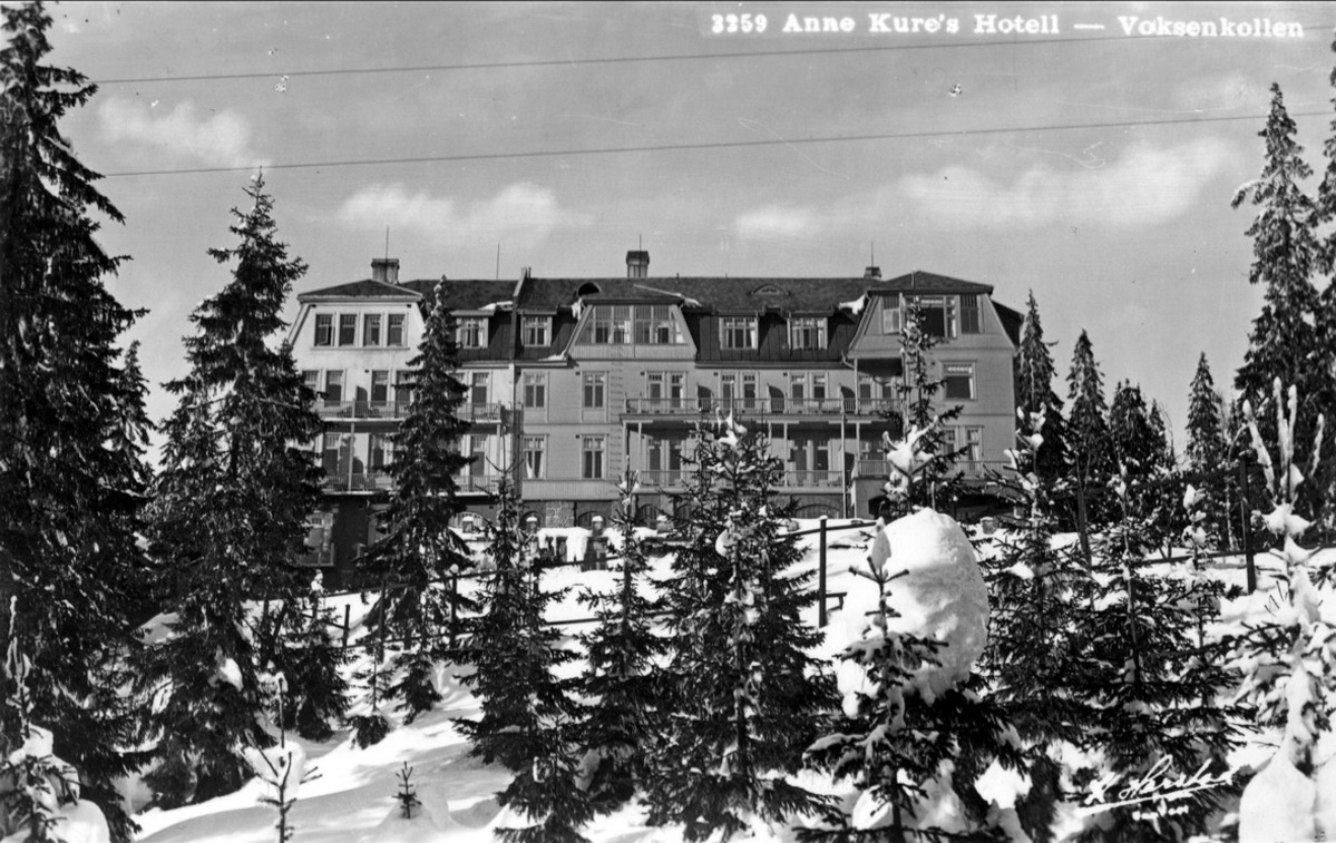 Anne Kures hotell (etter påbygning), Voksenkollveien 20, Oslo, ca. 1935